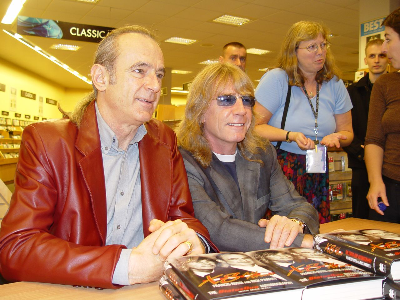 Francis Rossi (links), Rick Parfitt (rechts), Status Quo, britische Rockband, Signierstunde in Bournemouth